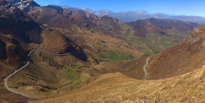 Bajada hacia el Cantábrico por el Portillo de Lunada, desde el collado de Bustalviente